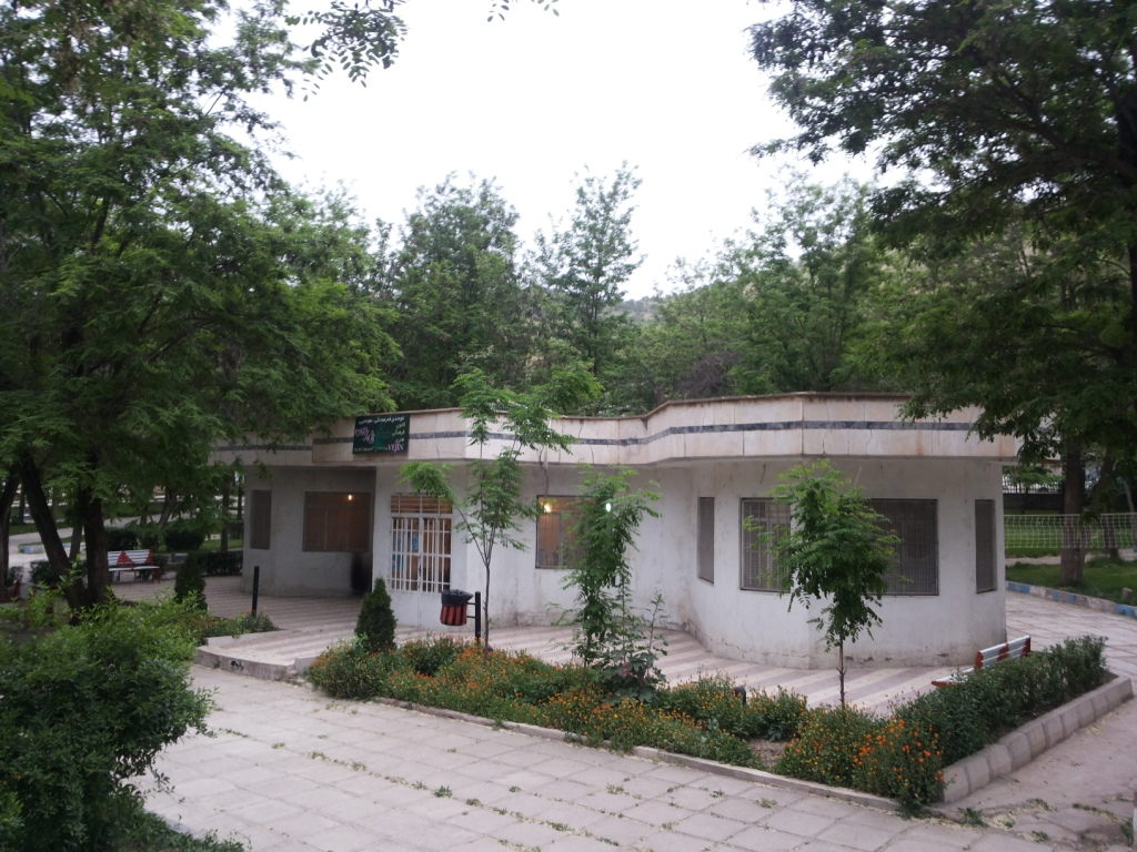 بنکەی سەرەکیی ناوەندی فەرھەنگی ھونەریی ڤەژین